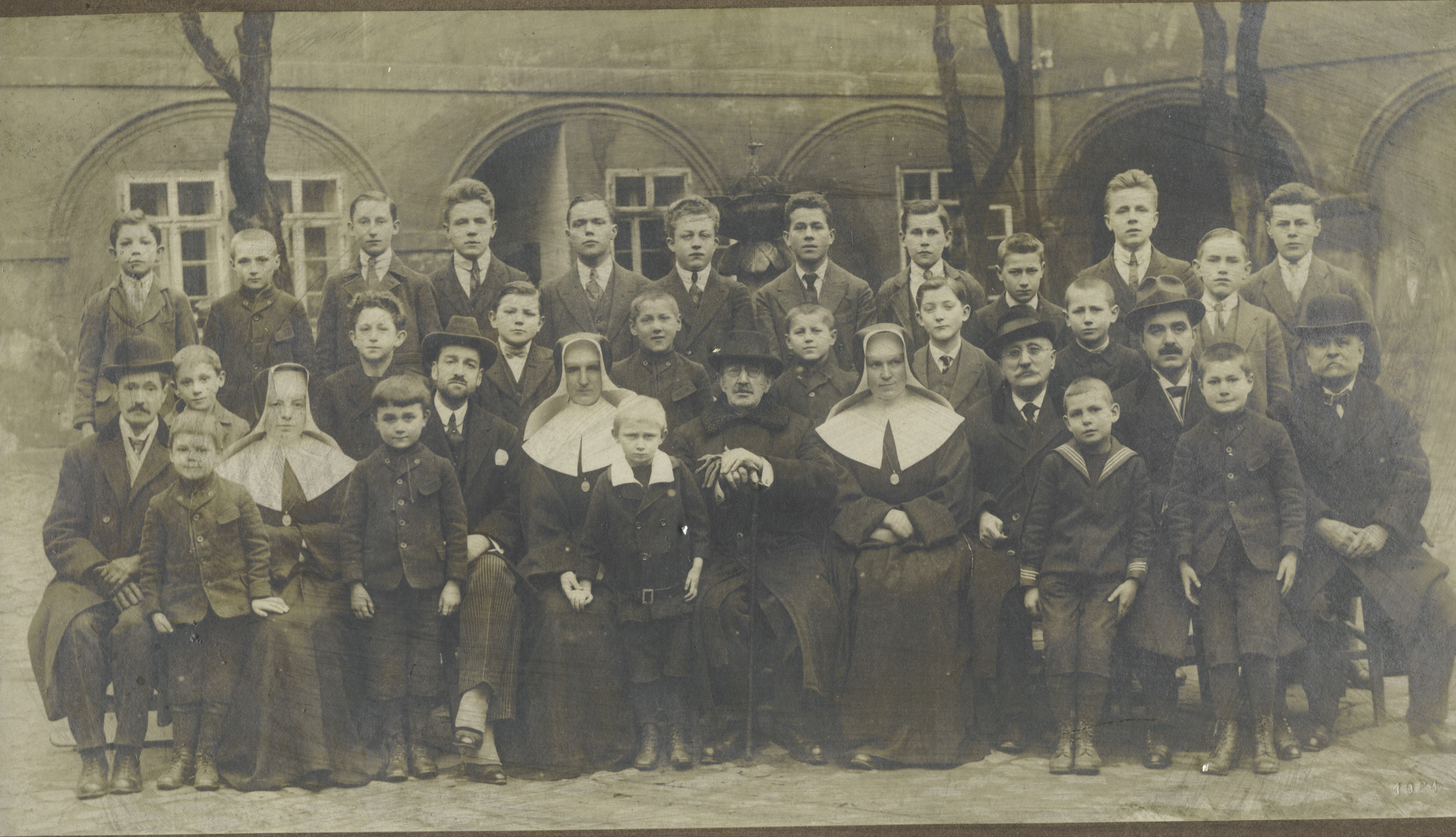 Foto degli orfani che risiedevano all'interno dell'edificio